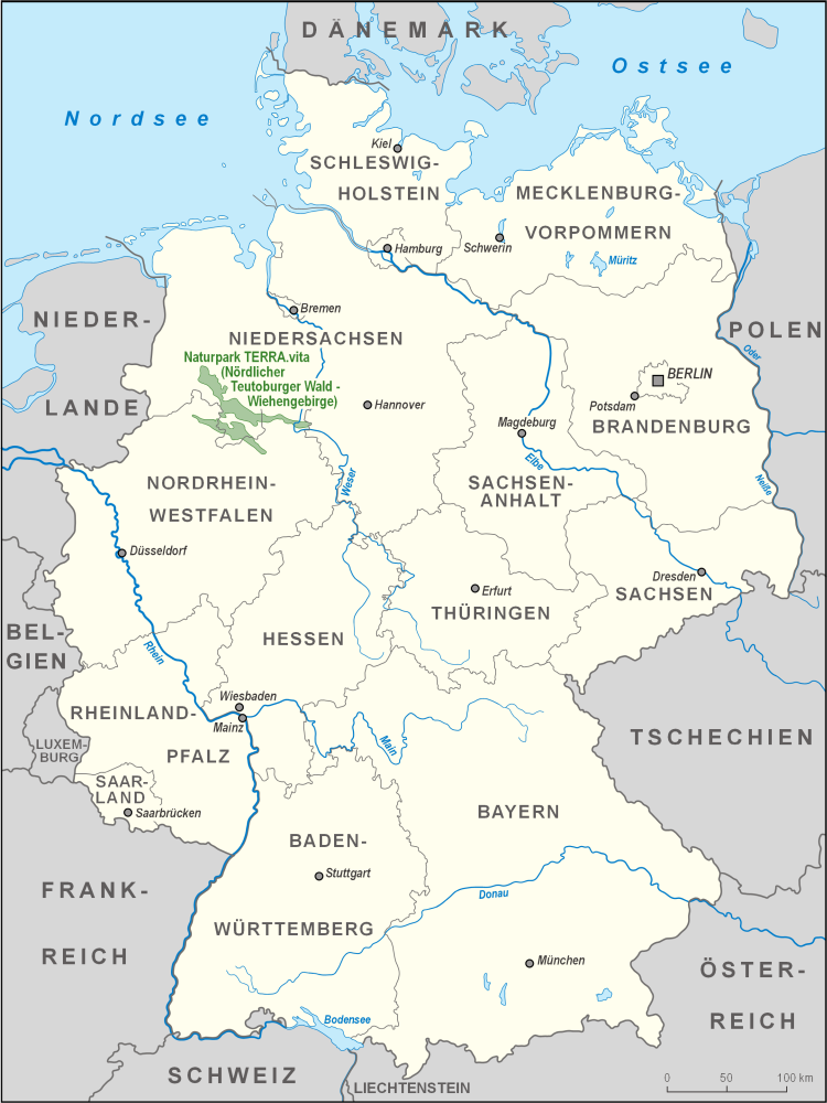 Karte des Naturparks TERRA.vita (Nördlicher Teutoburger Wald-Wiehengebirge) in Deutschland